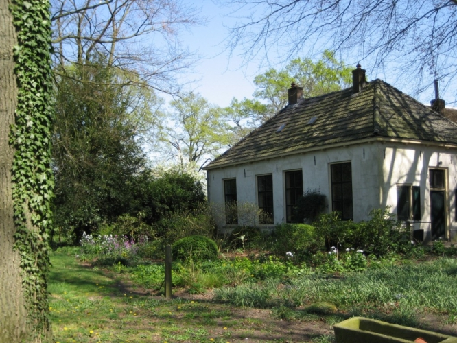 Voorkant katerstede Het Slief